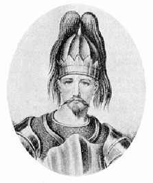 Мстислав Изяславич князь киевский 1167-1169